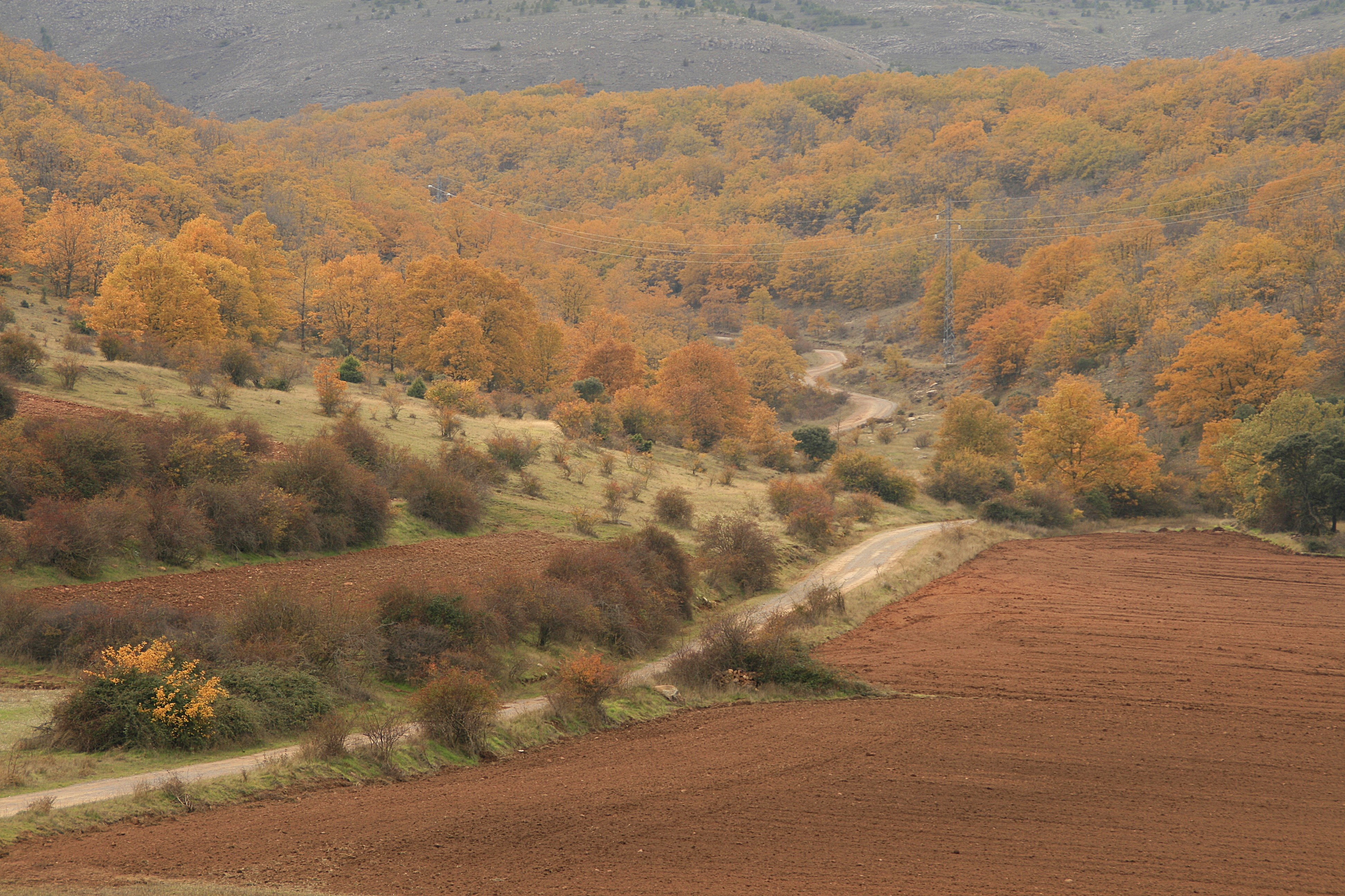 Ólvega.Soria.